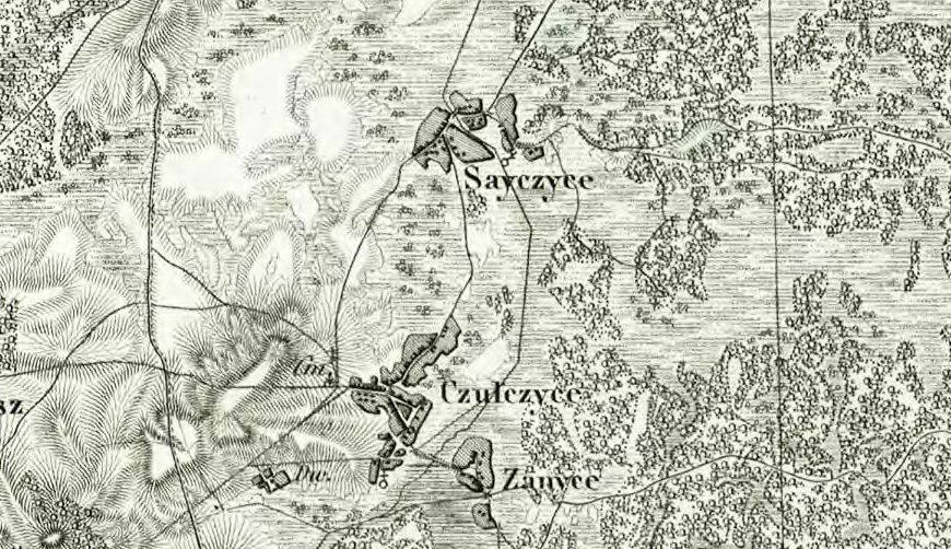 Czułczyce i Sajczyce (powiat chełmski) na Mapie Topograficznej Krolestwa Polskiego z 1839 roku